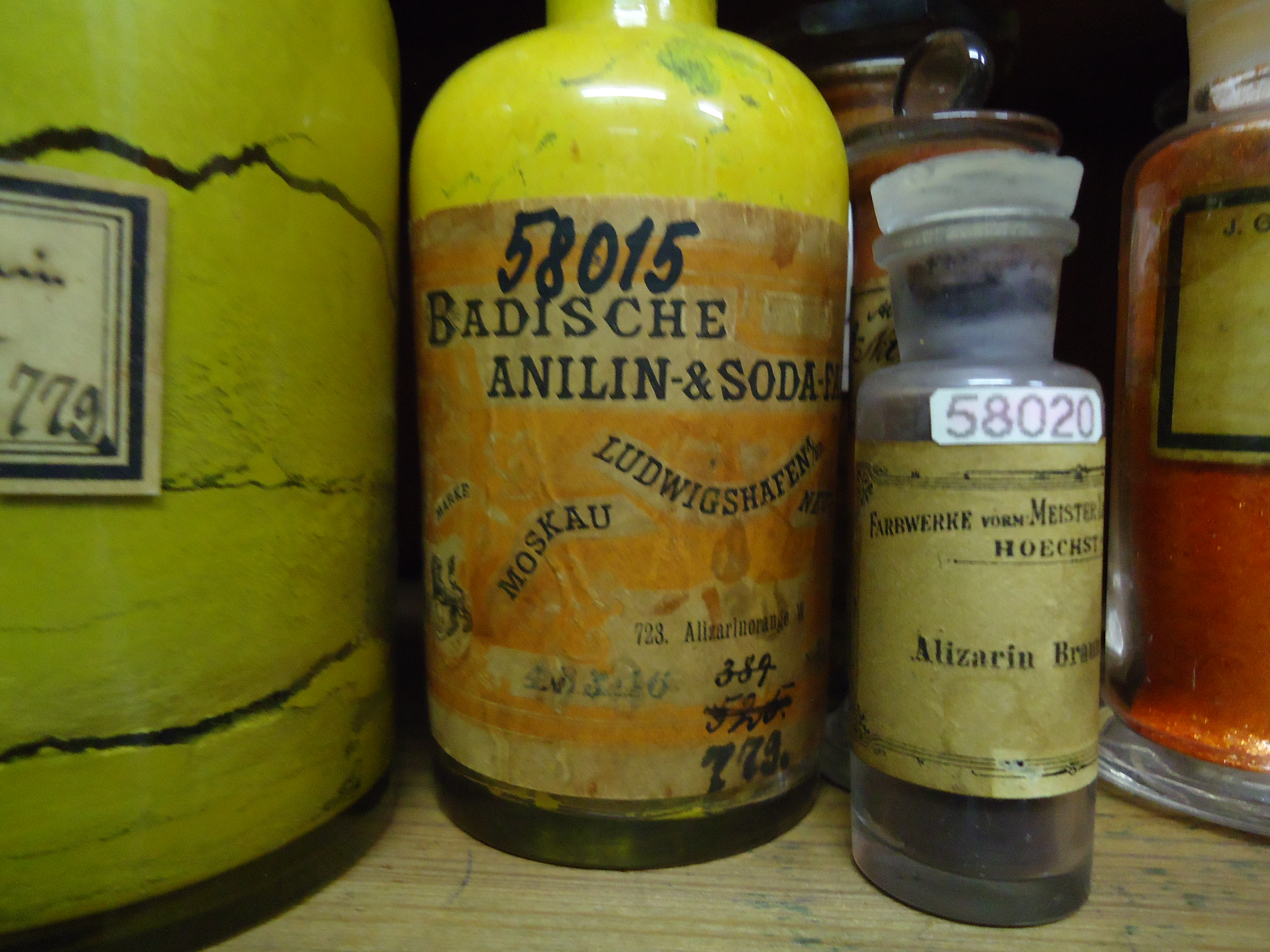 Blick in die Historische Farbstoffsammlung der TU Dresden (Historische Farbstoffsammlung der TU Dresden)